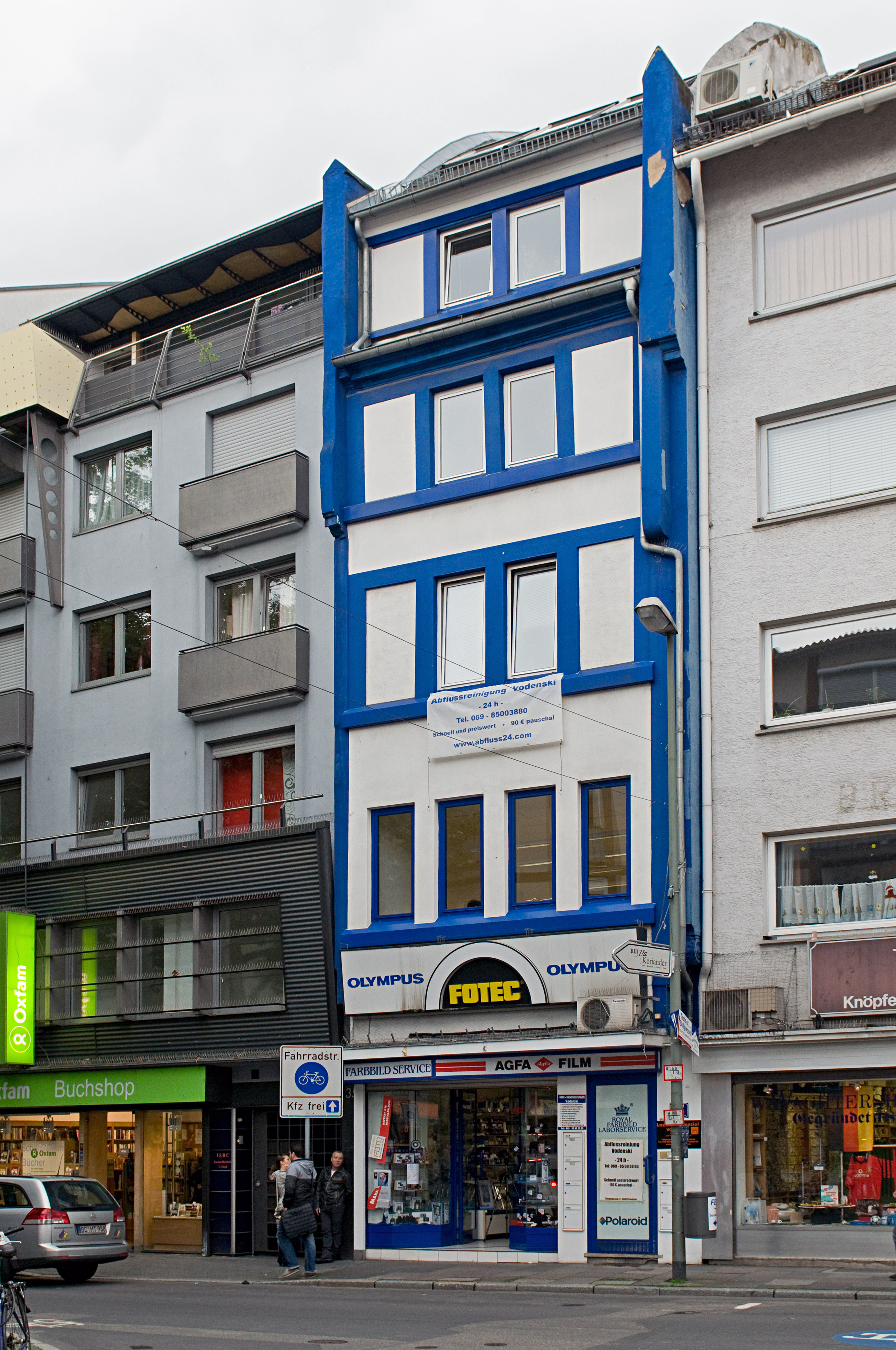 Töngesgasse 37, Frankfurt-Altstadt